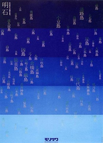 Diseño grafico japones